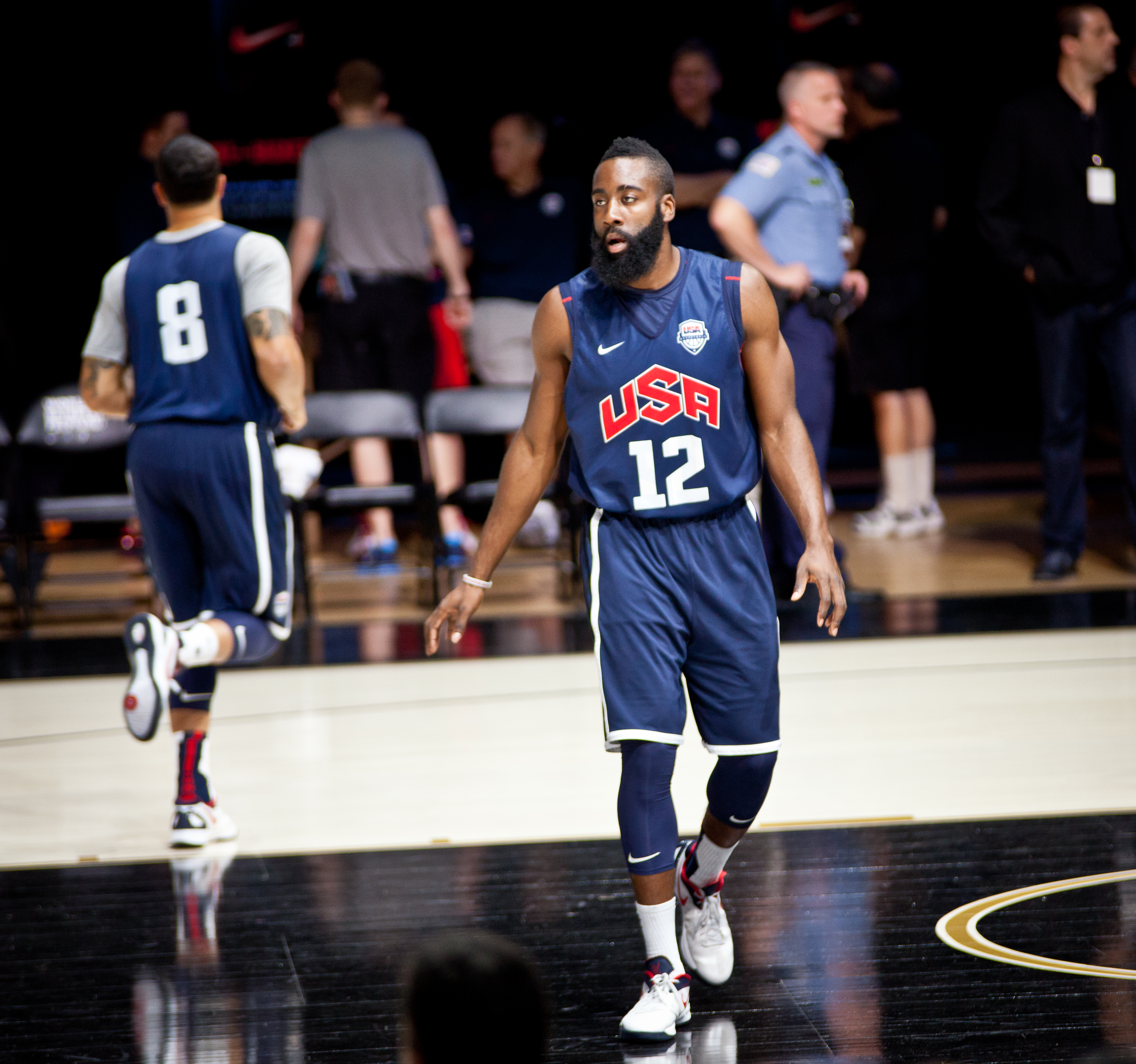 James Harden